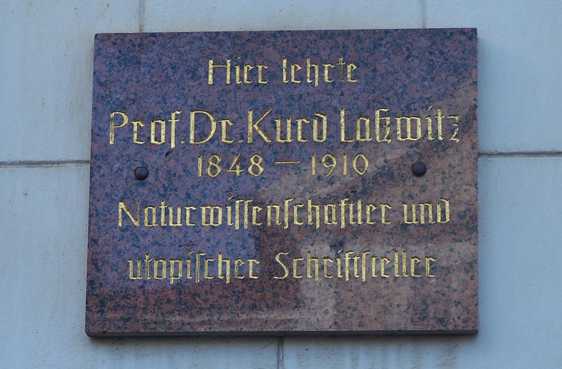 Gedenktafeln in Gotha Prof. Dr. Kurd Laßwitz.